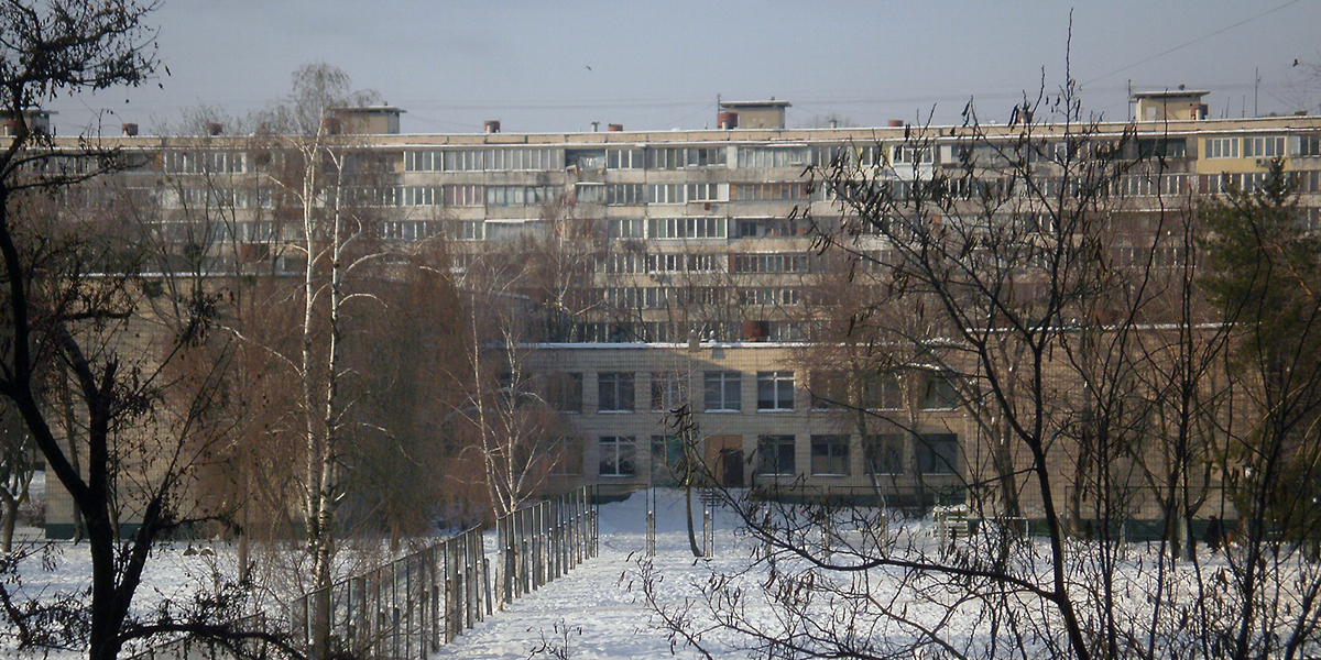 школа № 213, Киев